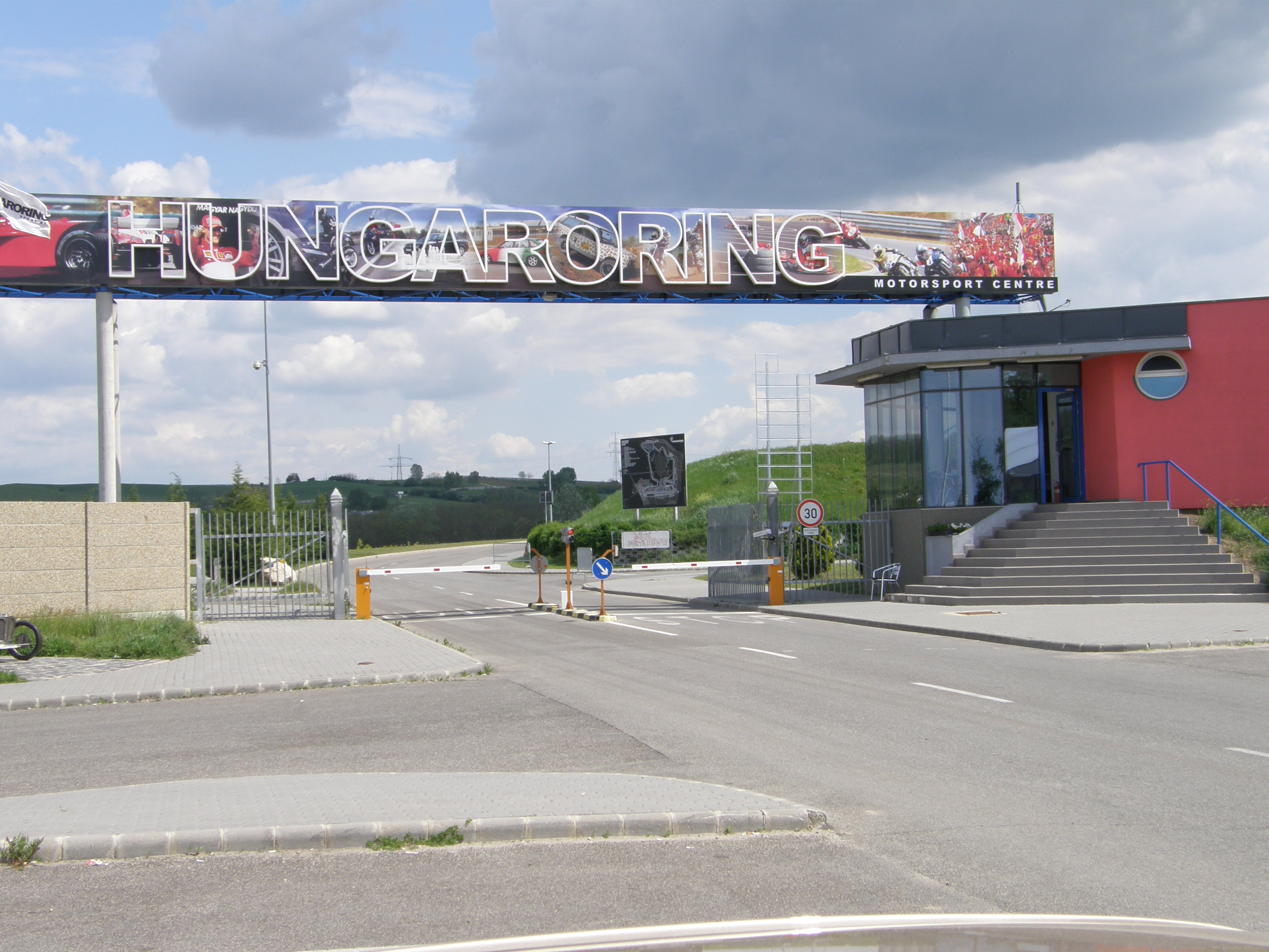 Hungaroring